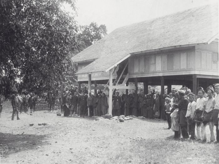 foto. Huis van Panglima Polim te Glé Jeuëng, Groot Atjeh